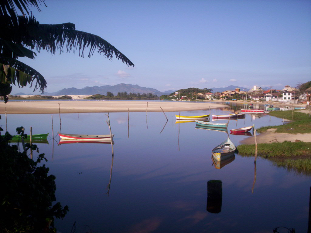 Guarda do Embaú, vista a partir de um banco na praça do balneário.